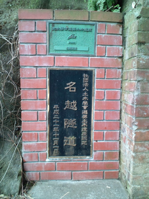 名越隧道鎌倉側出口にある土木学会による銘板。